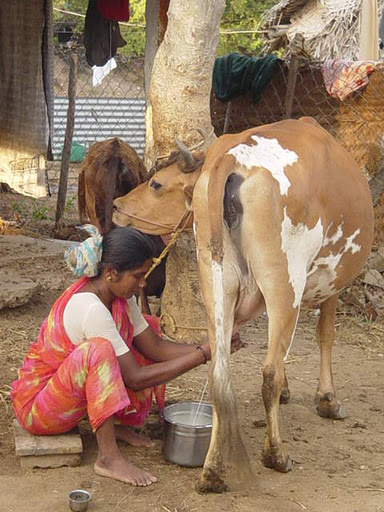 தமிழகத்தின் மிகத் தொன்மையான வழக்கமான பசுமாட்டிடமிருந்து பால்கறக்கும் பெண்.